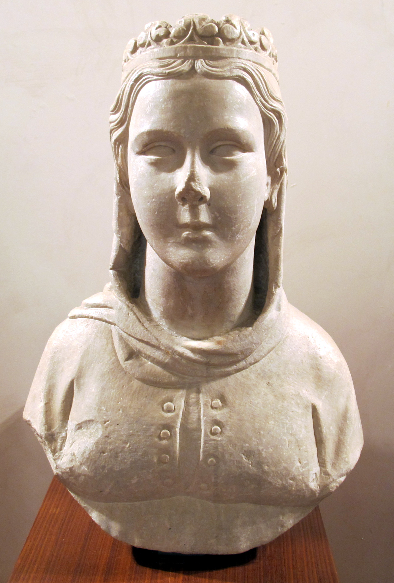 Tino di Camaino, Fede